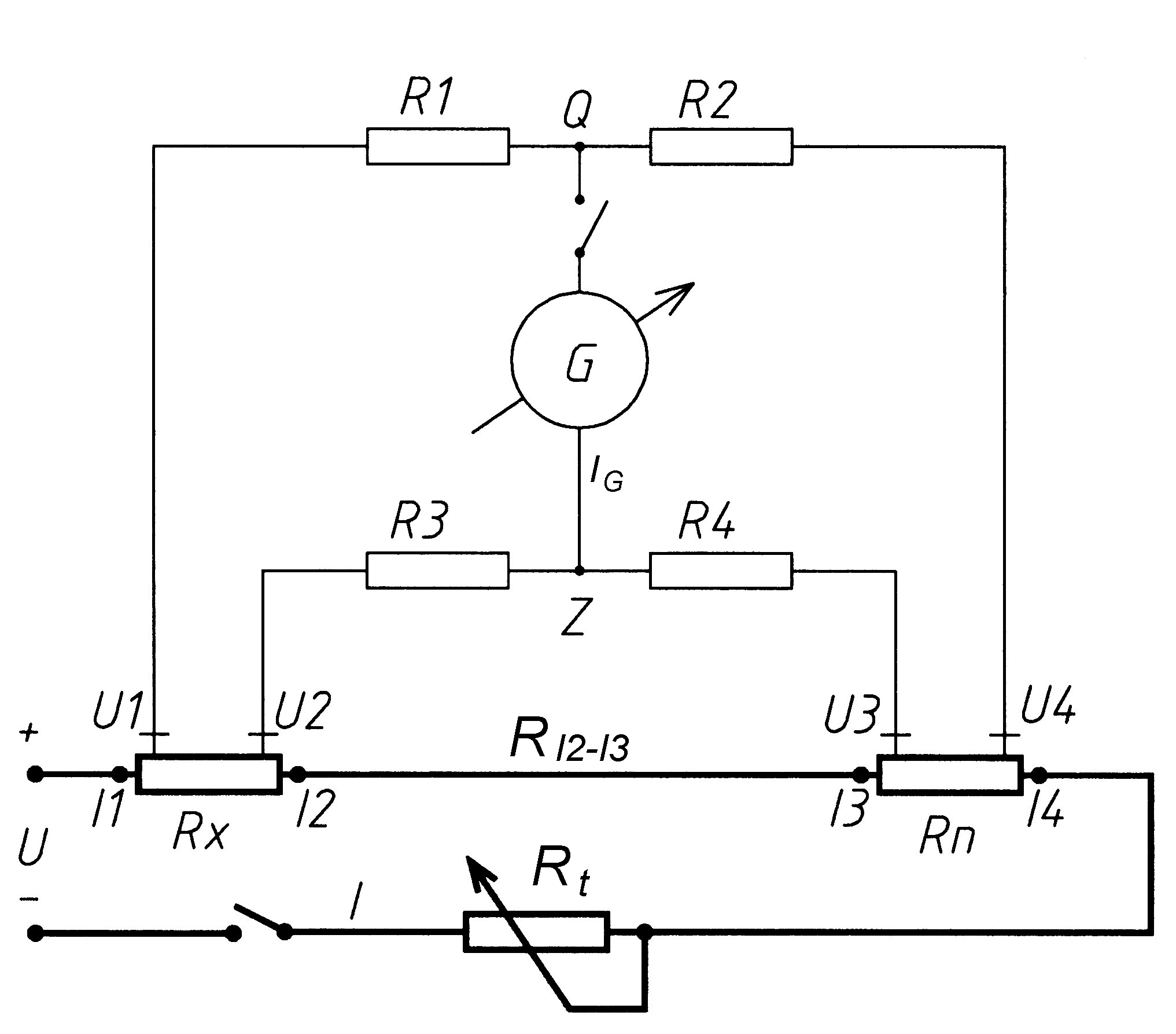 Thomson-híd elvi kapcsolása